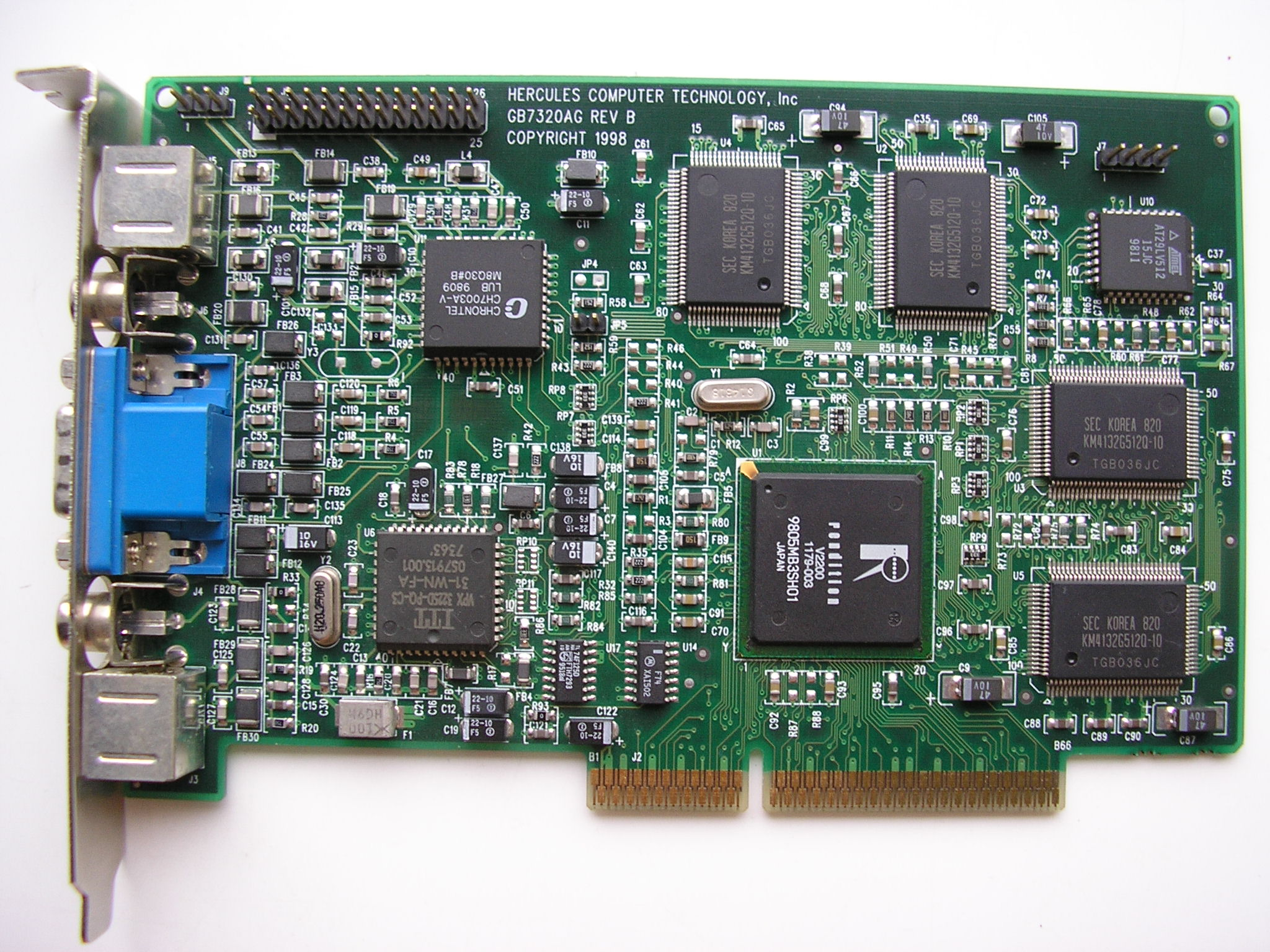 Hercules Thriller 3D TH2318SGA, Rendition Vérité v2200, AGP, 8MB SGRAM, ViVo (Video In & Video Out)